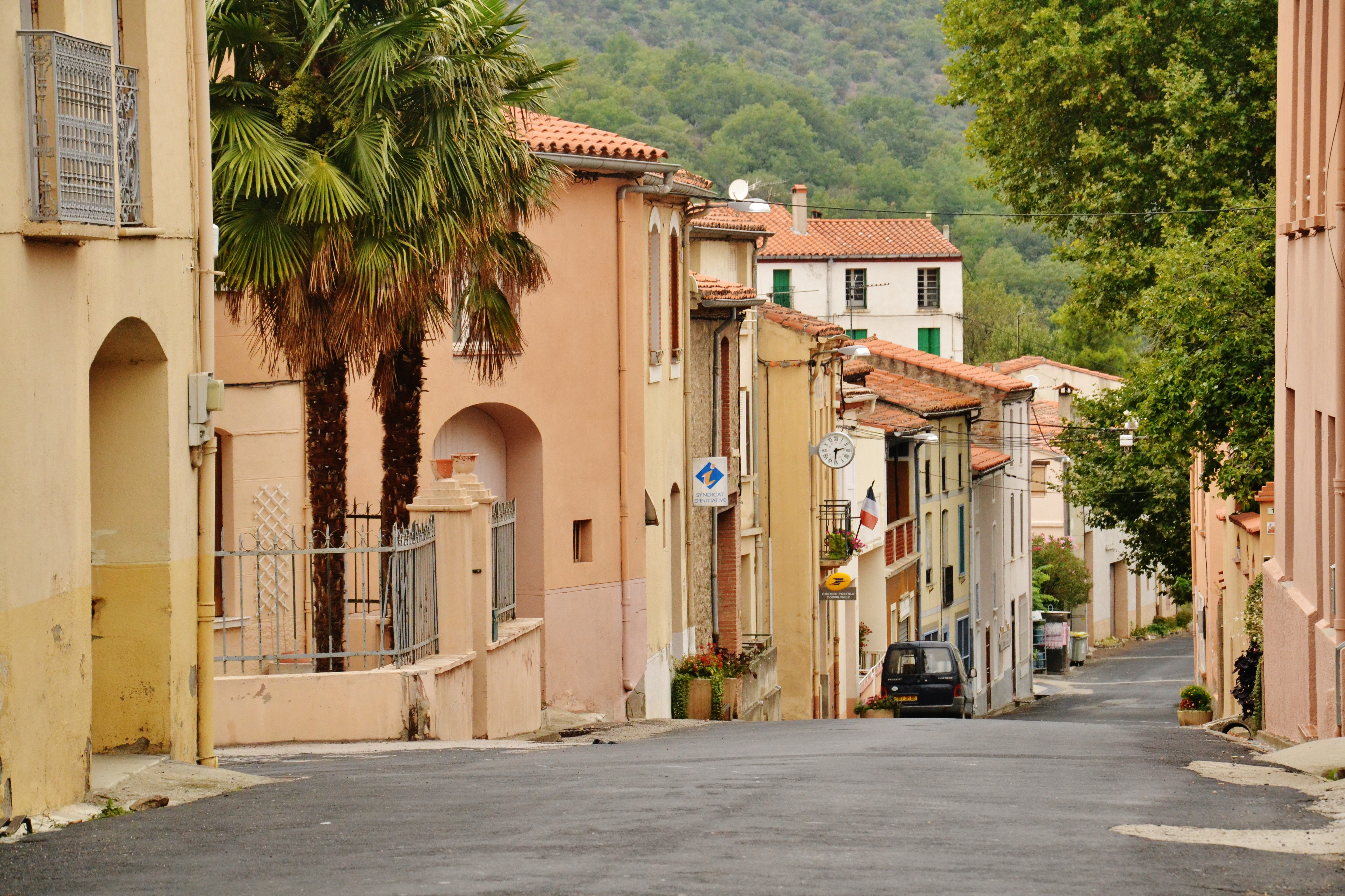 Le centre-bourg d'Ansignan (Pyrénées-Orientales, France)